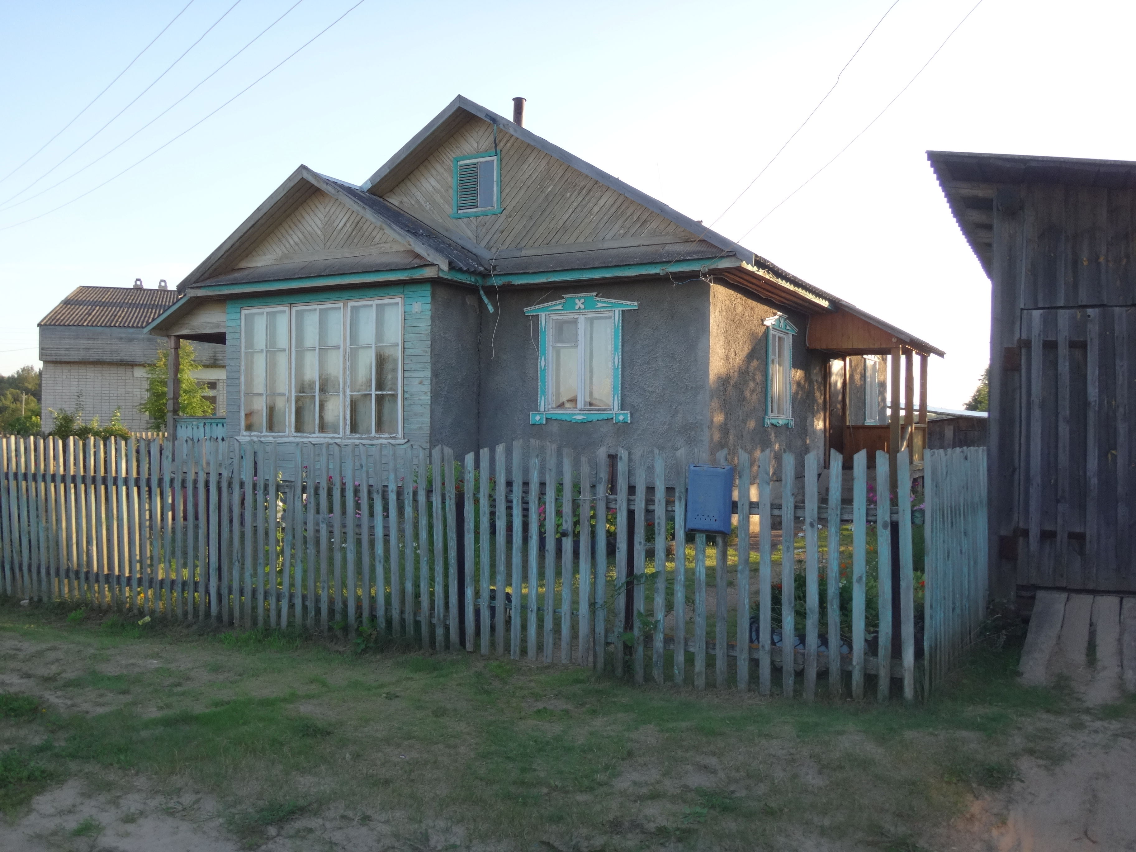 Арболитовый дом